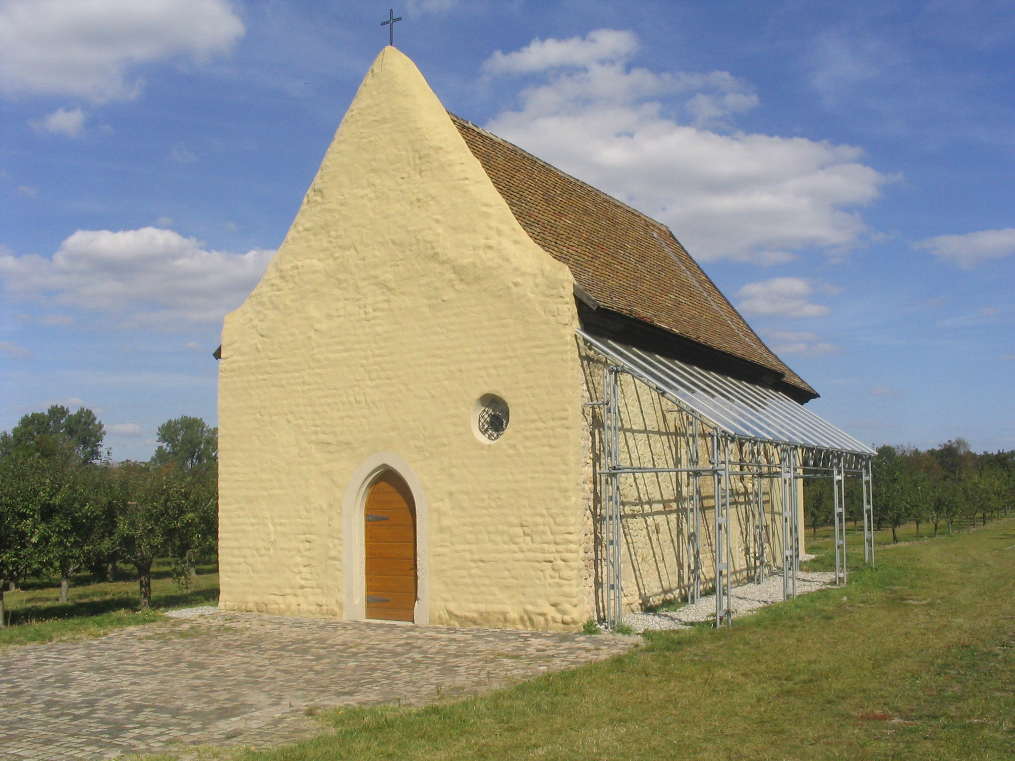 St. Georgs-Kapelle in Heidesheim am Rhein, aufgenommen am 15.09.2007 von Dr. Hagen Graebner